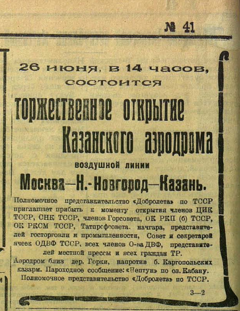 Анонс открытия аэродрома Казань из газеты «Красная Татария» (Казань), 24 июня 1924, №41